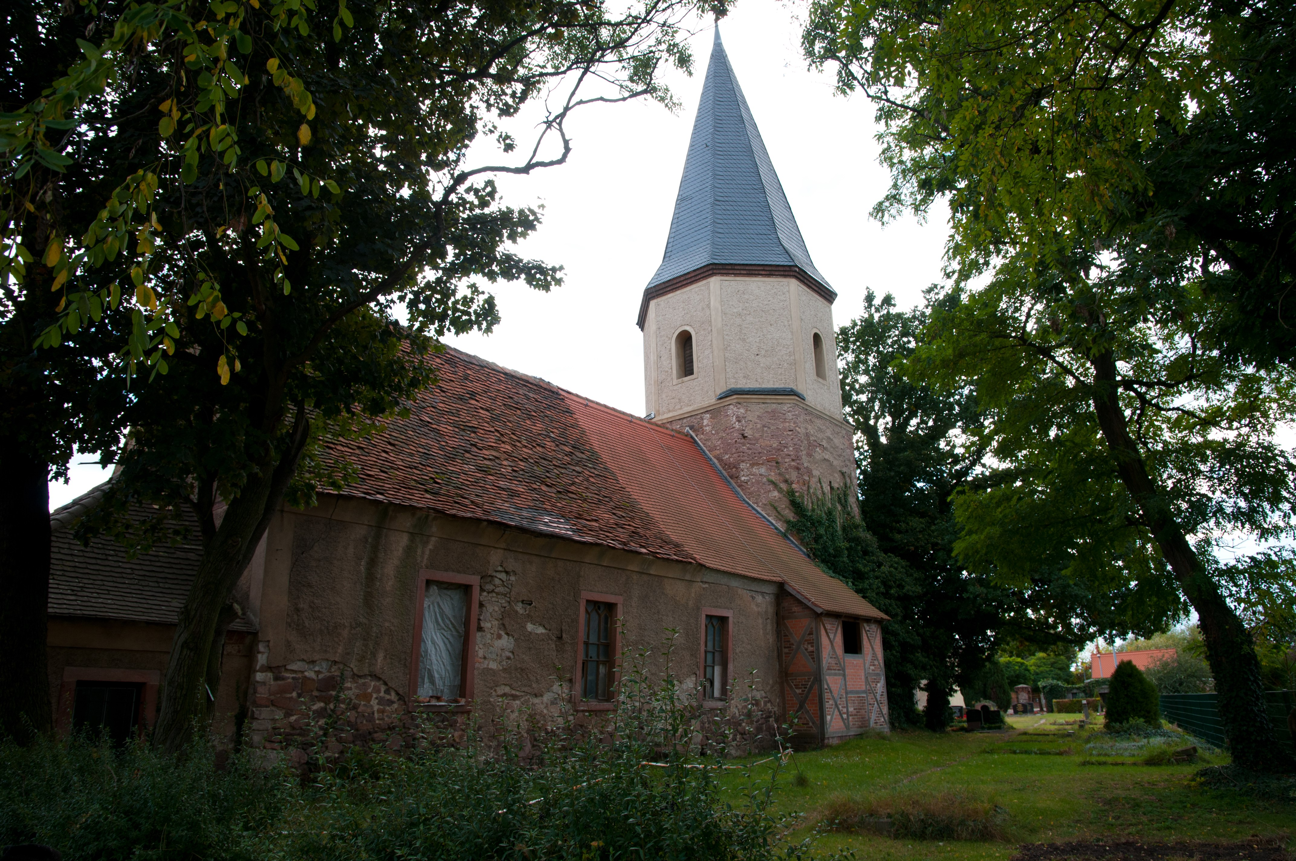 Kösseln Kirche (Sachsen Anhalt, Deutschland)